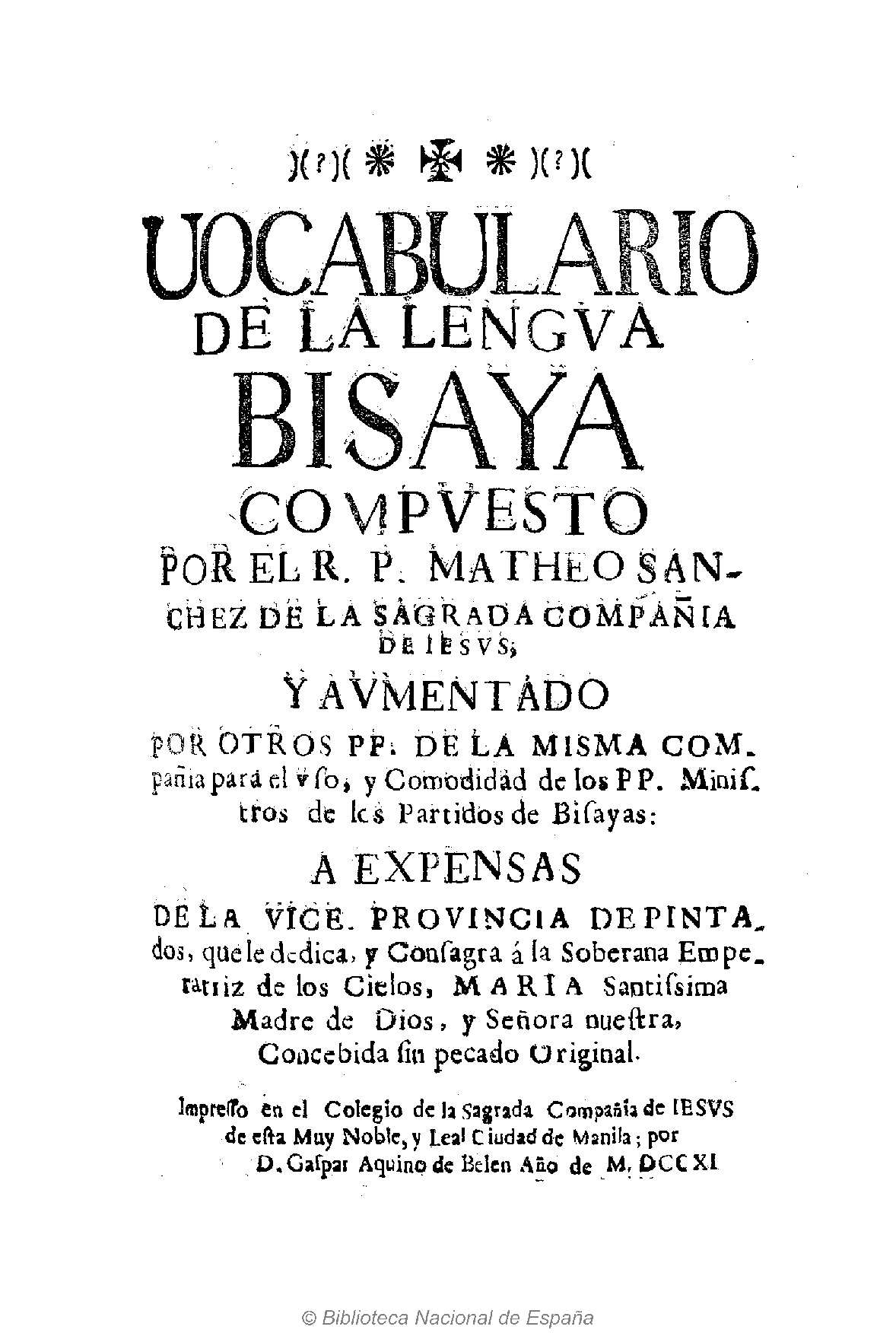 Vocabulario de la lengua Bisaya, compuesto por el R.P. Matheo Sánchez de la Sagrada Compañia de Iesus, y aumentado por otros PP. de la misma Compañia para el vso ... de los PP. Ministros de los partidos de Bisayas Autor: Sánchez, Mateo Fecha: 1711 Datos de edición: [Manila] Impresso en el Colegio de la Sagrada Compañia de Iesus de ... Manila, por Gaspar Aquino de Belen